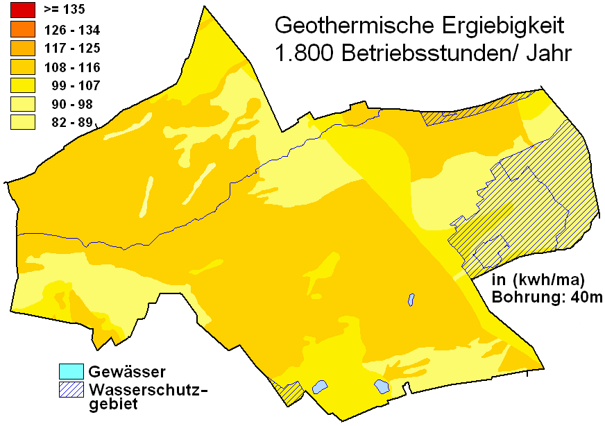 geothermische Karte Hövelhof, Kreis Paderborn, Deutschland.